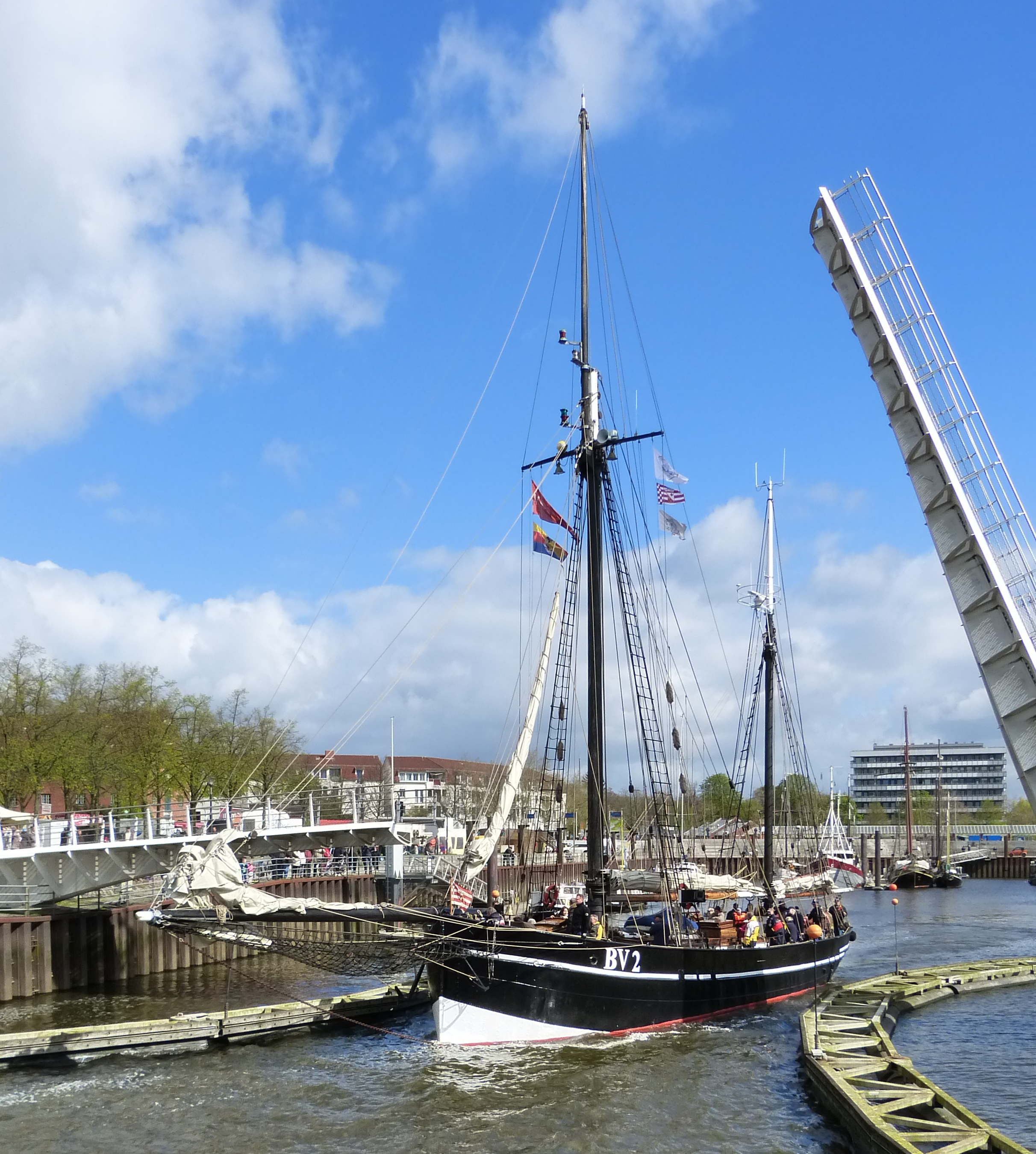 Segellogger BV 2 Vegesack in Bremen, Am Vegesacker HafenDas abgebildete Objekt (bewegliches Denkmal) ist ein geschütztes Kulturdenkmal in der Freien Hansestadt Bremen, mit der Nr. 2899 beim Landesamt für Denkmalpflege registriert.